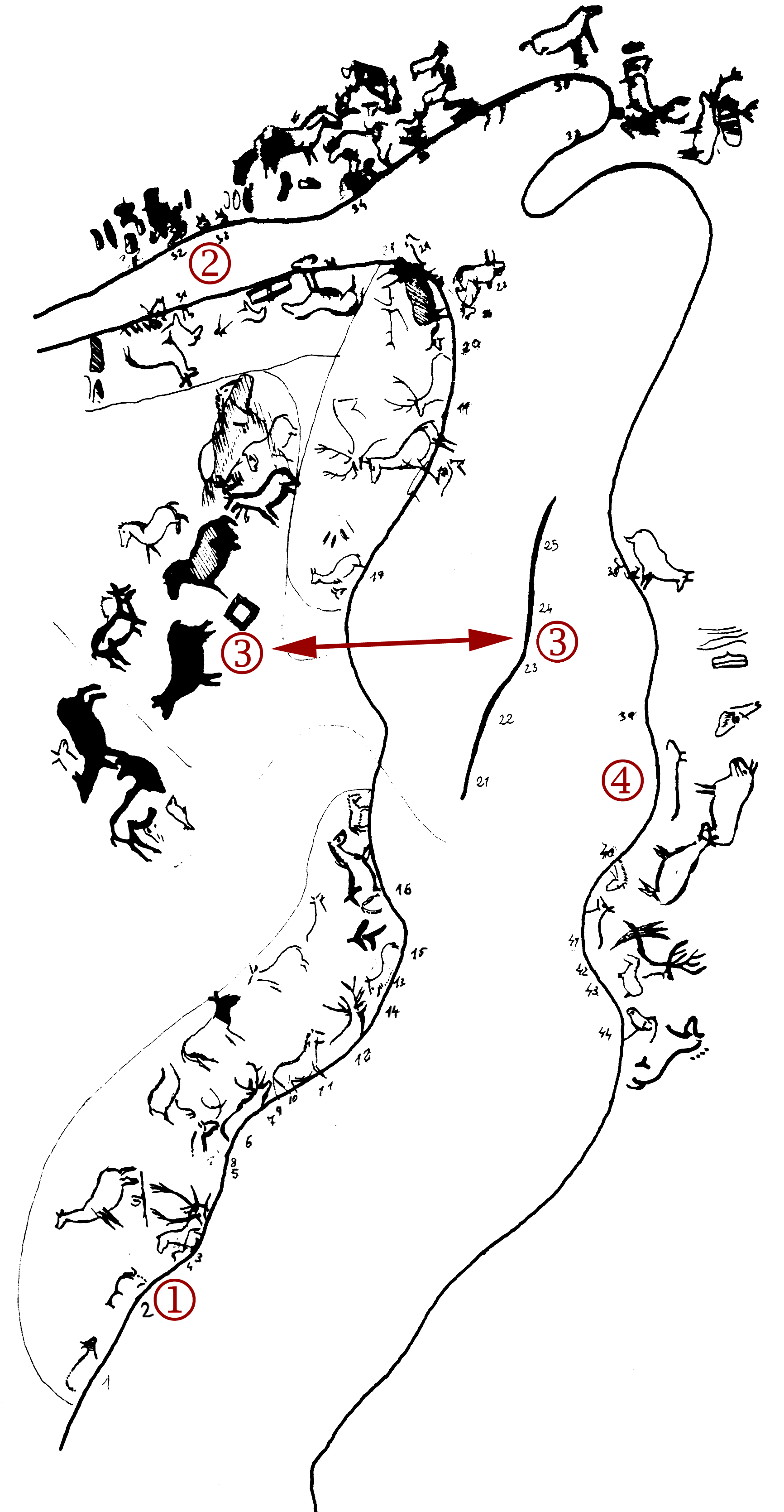 Plano de la Galería A (primer santuario) de la Cueva de La Pasiega, en el monte Castillo, localidad de Puente Viesgo (Cantabria, España)